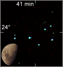 Plejaden und Mond (Montage)